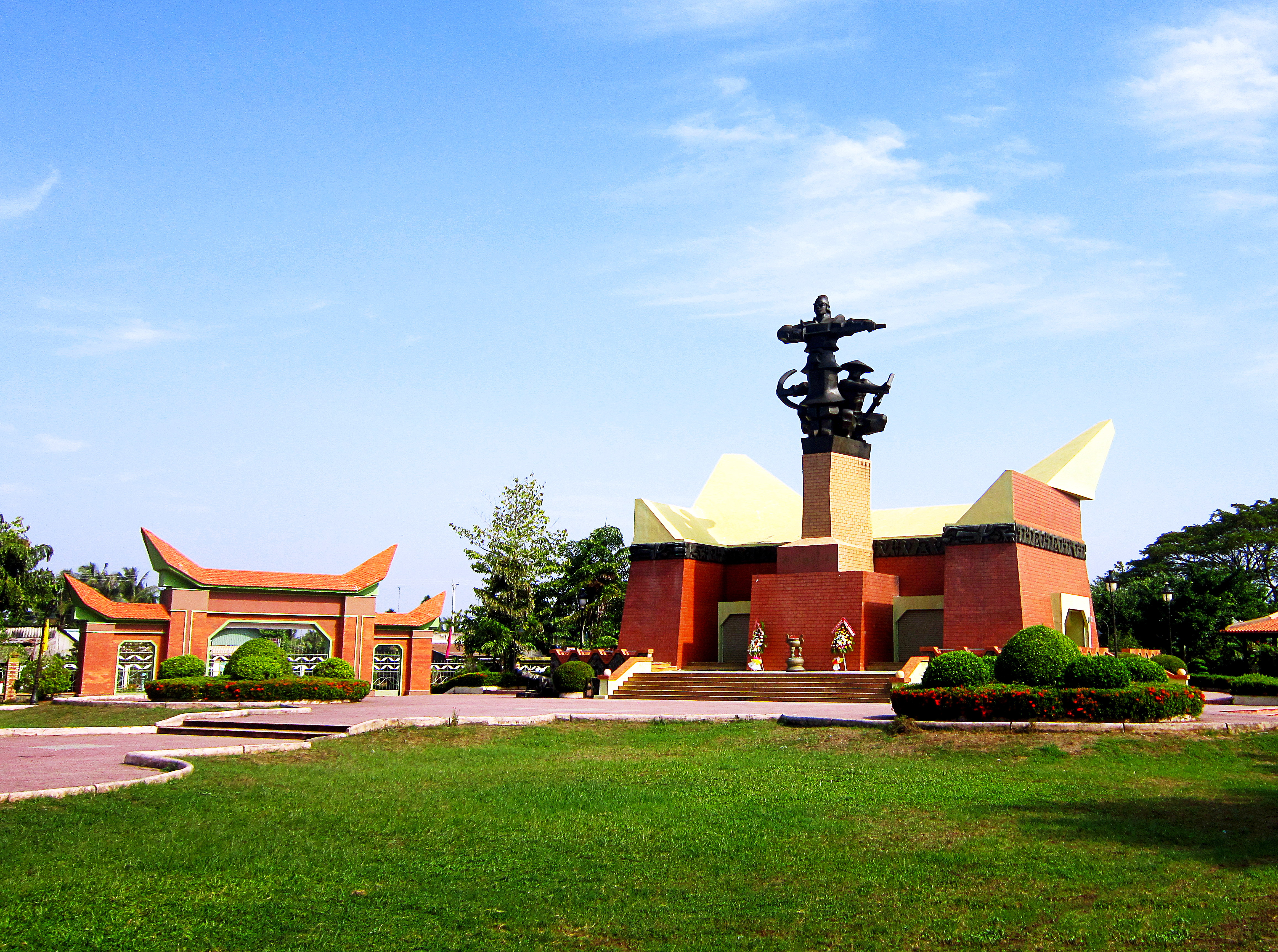 Khu di tích chiến thắng Rạch Gầm - Xoài Mút thuộc ấp Đông, xã Kim Sơn, huyện Châu Thành, tỉnh Tiền Giang, Việt Nam.